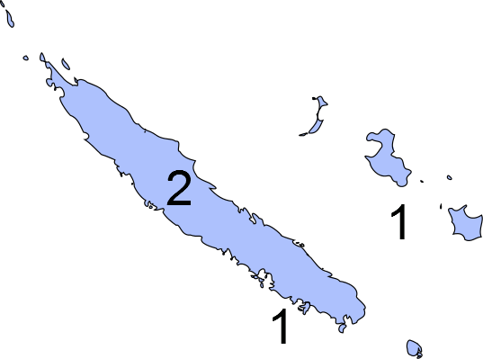 Résultats des élections législatives de Nouvelle-Calédonie en 2012